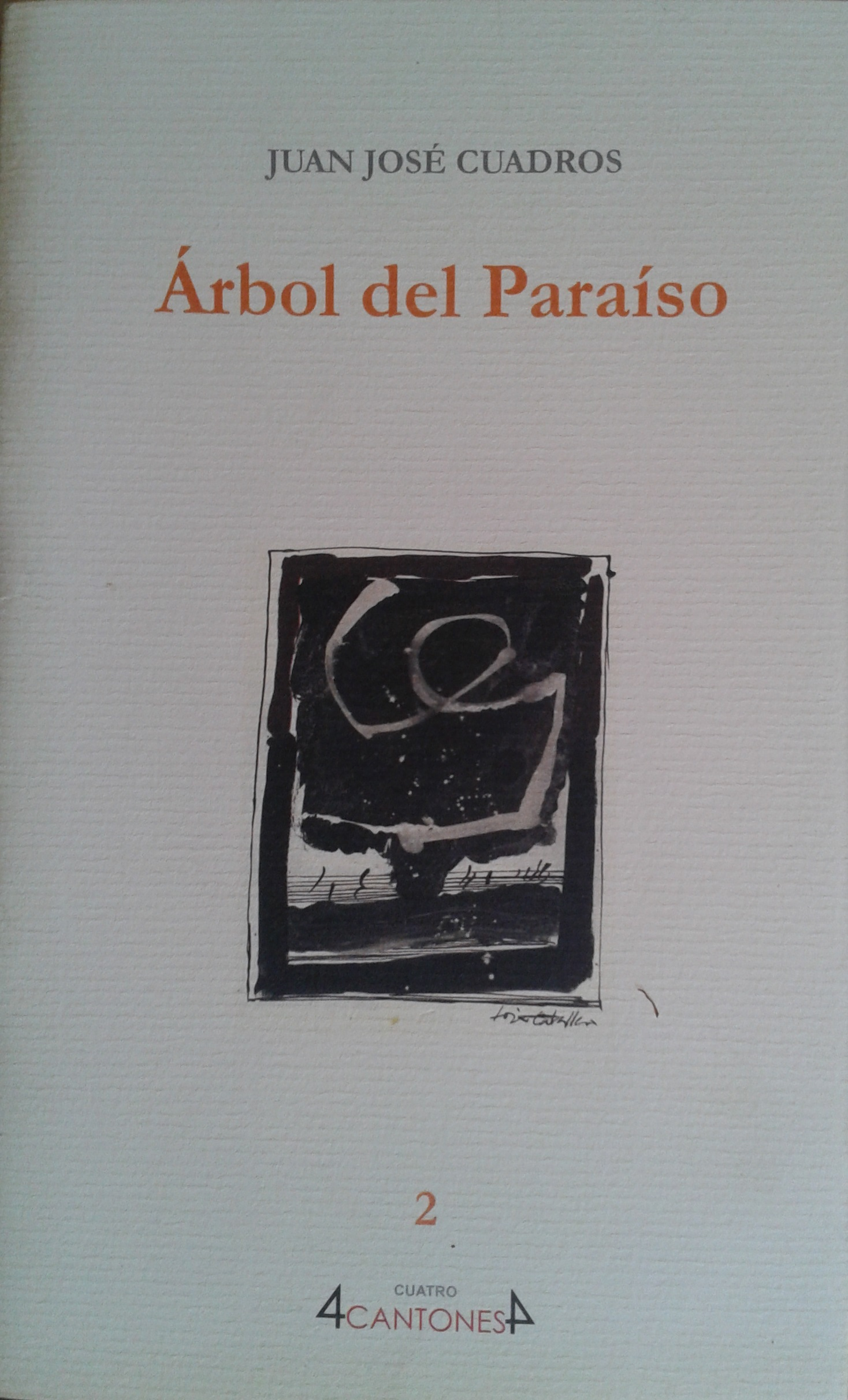 El árbol del Paraíso de Juan José Cuadros Pérez, 2007